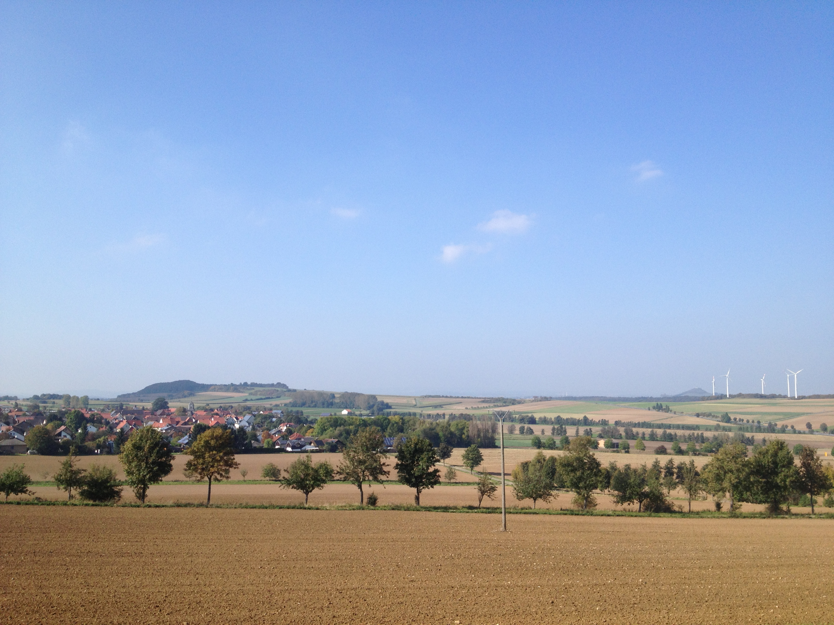 Blick von der Außenterasse der Grillhütte Oberlistingen über Oberlistingen (links) Richtung Warburg. An der Grillhütte Oberlistingen verlaufen der Fulda-Diemel-Weg, der Märchenlandweg und die Extratour H1 des Habichtswaldsteiges vorbei.